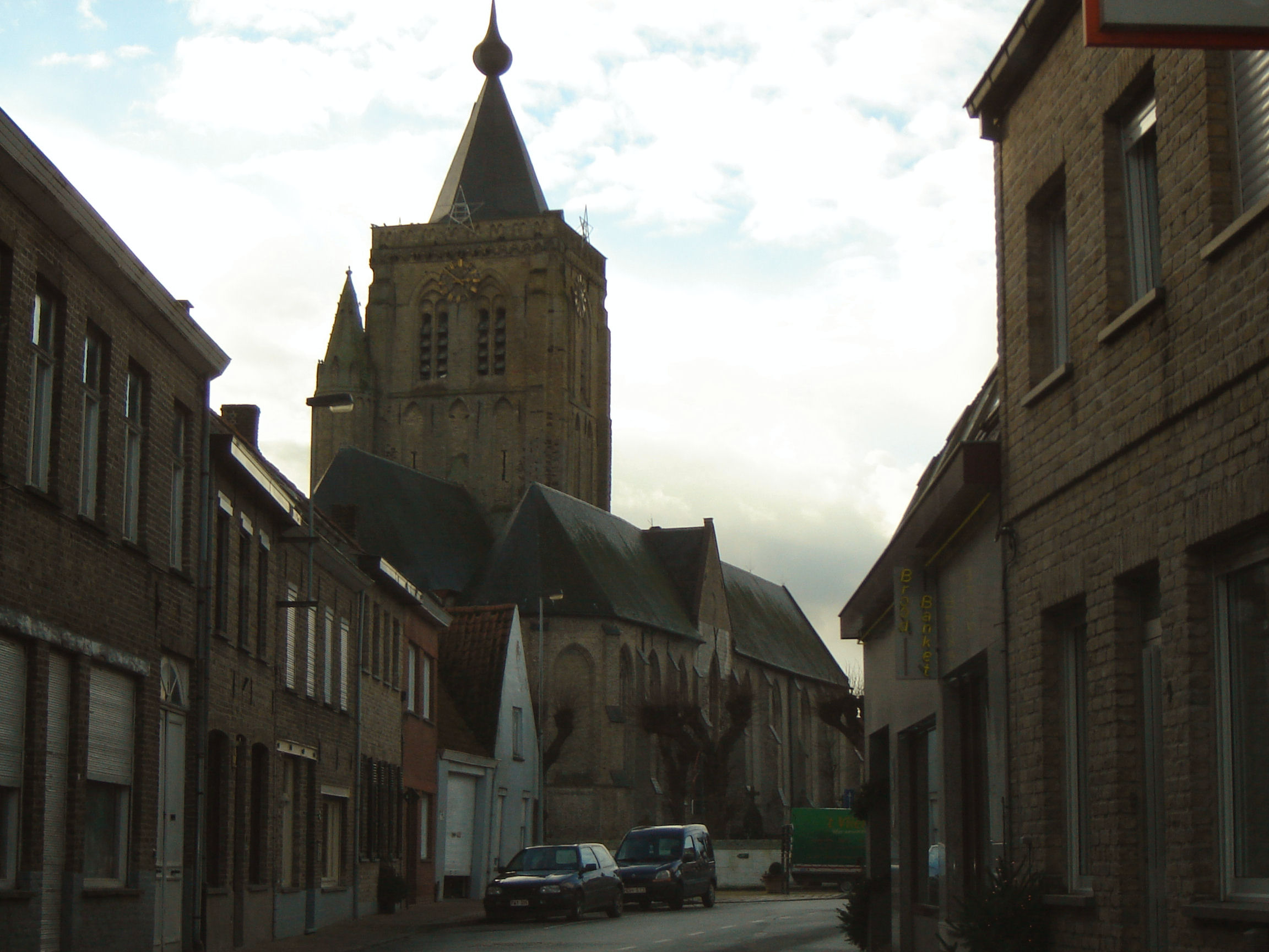 Sint Audomaruskerk in Alveringem-centrum, Alveringem. Saint Audomar Church in Alveringem proper, Alveringem, West-Flanders, Belgium